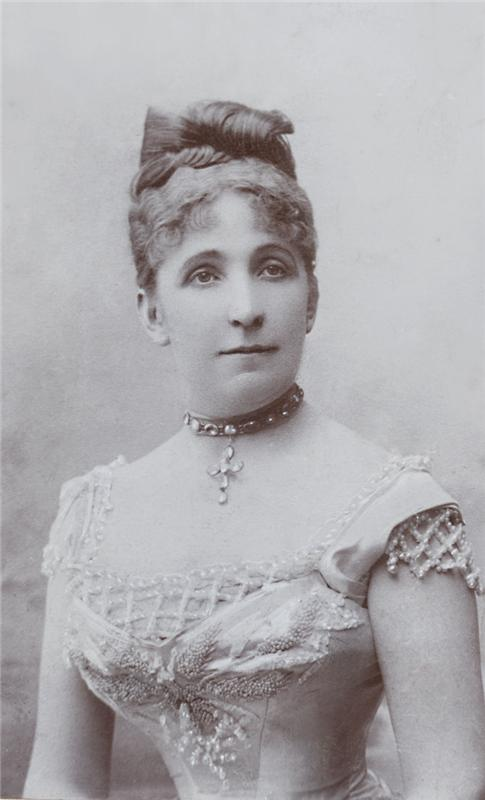 Julie Šamberková rozená Knornová